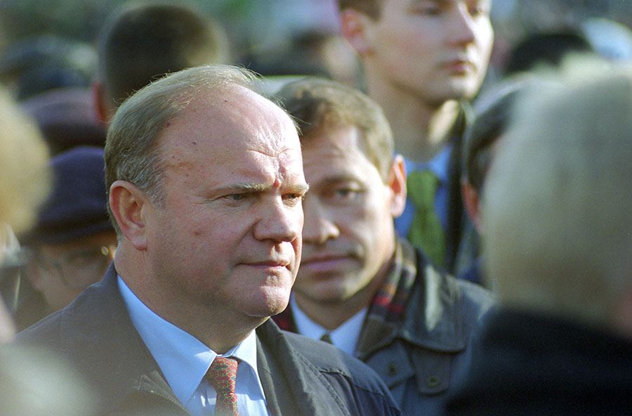 Зюганов, Геннадий Андреевич